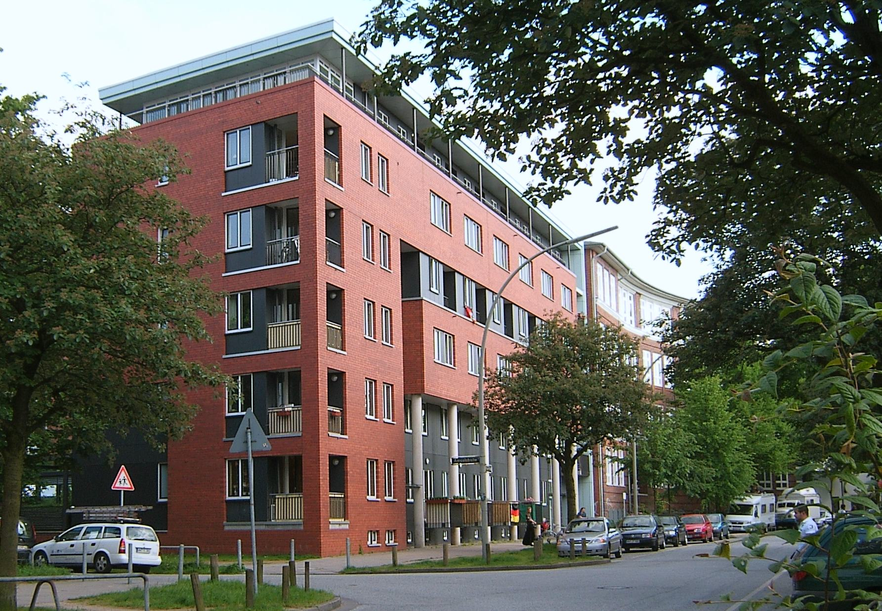 Hamburg, Barmbek-Süd, Hansa-Colleg